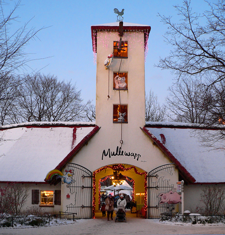 Kinderland Mullewapp im Zoo Hannover